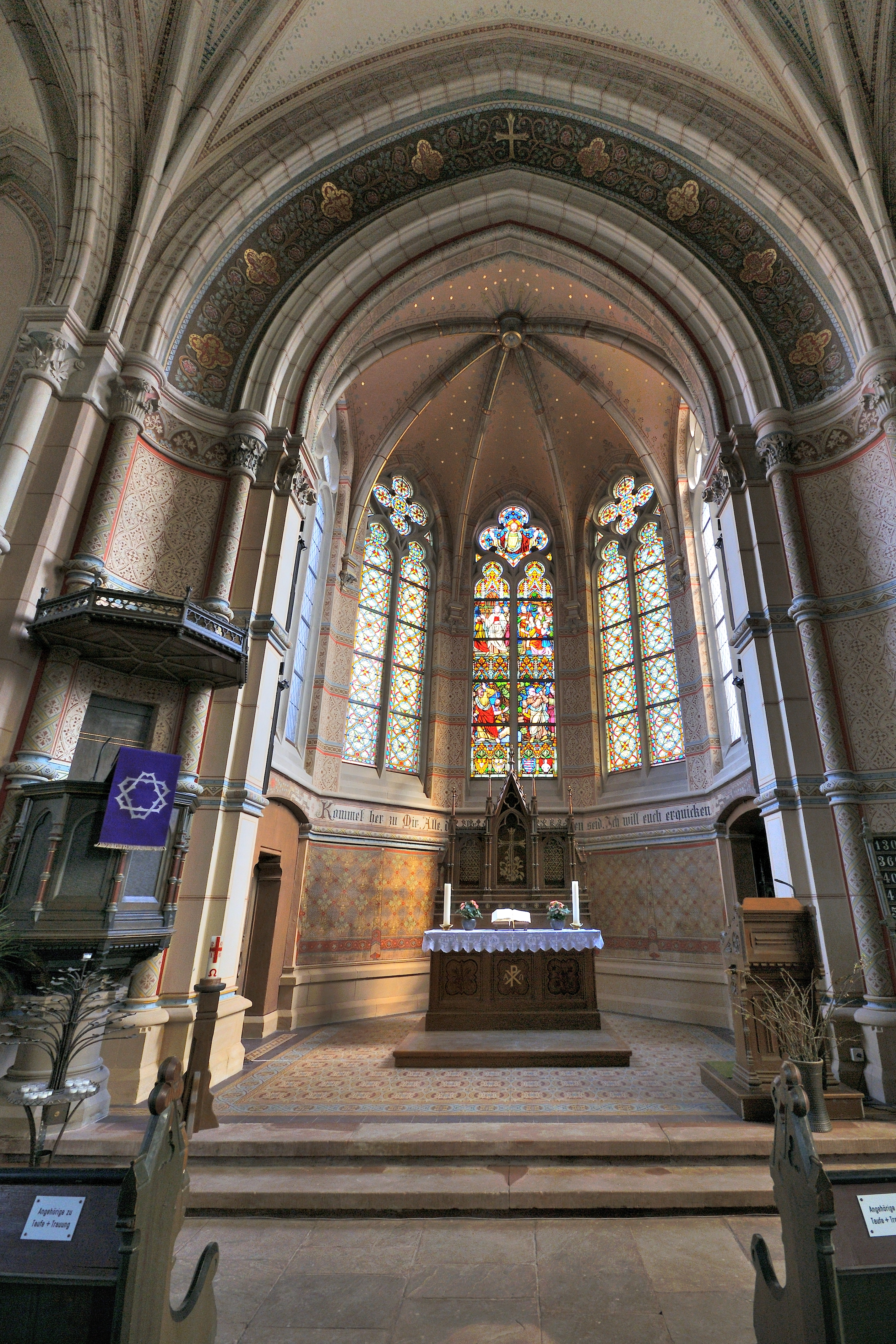 Wanfried, ev. Kirche, Altar nach Renovierung 2010